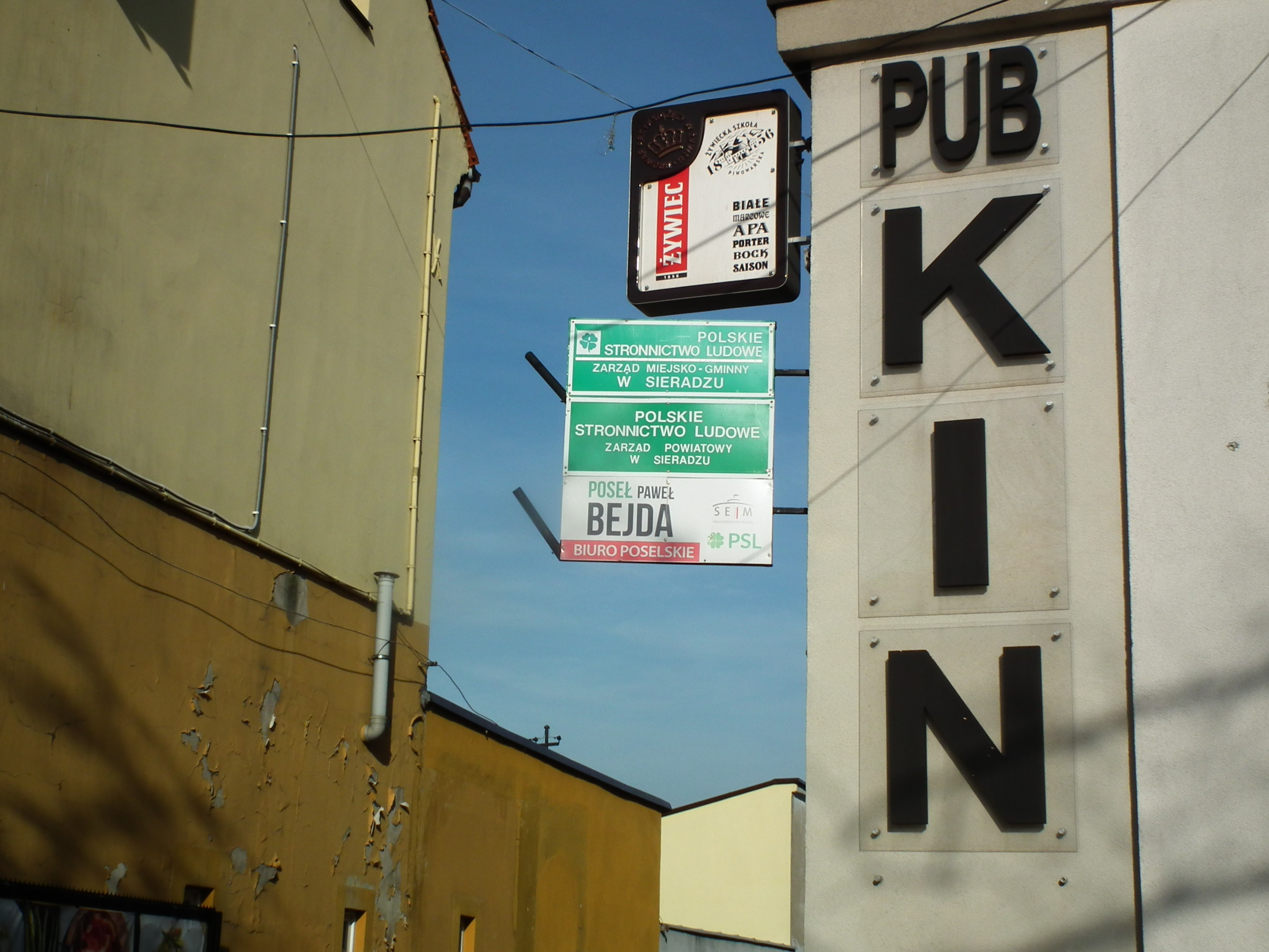 Pub Kin i biuro poselskie Pawła Bejdy z PSL. Sieradz.